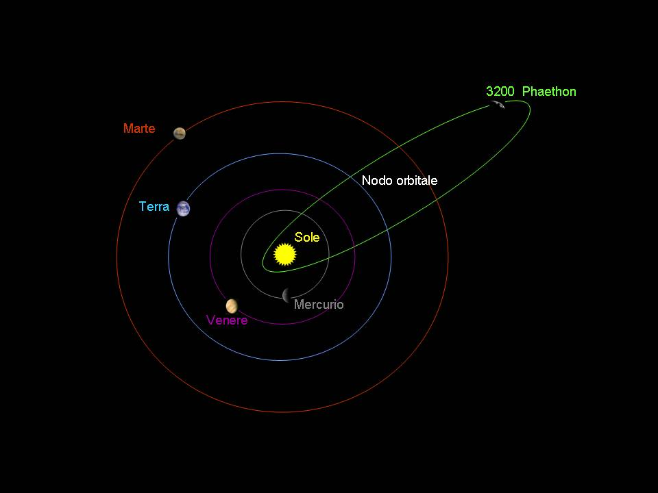 3200 Phaethon orbit. Foto personale.Licenza